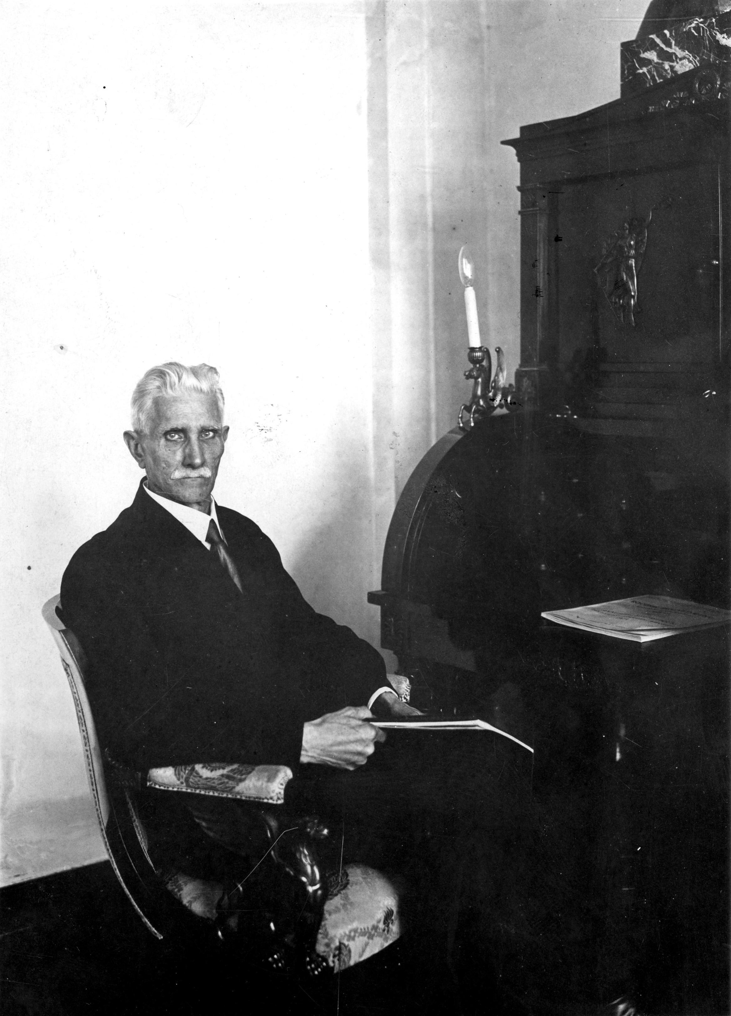 Ignacy Daszyński, marszałek Sejmu. W gabinecie pracy.